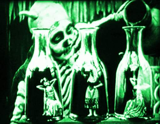 Photogramme tiré du film Le spectre rouge réalisé en 1907 par Segundo de Chomón